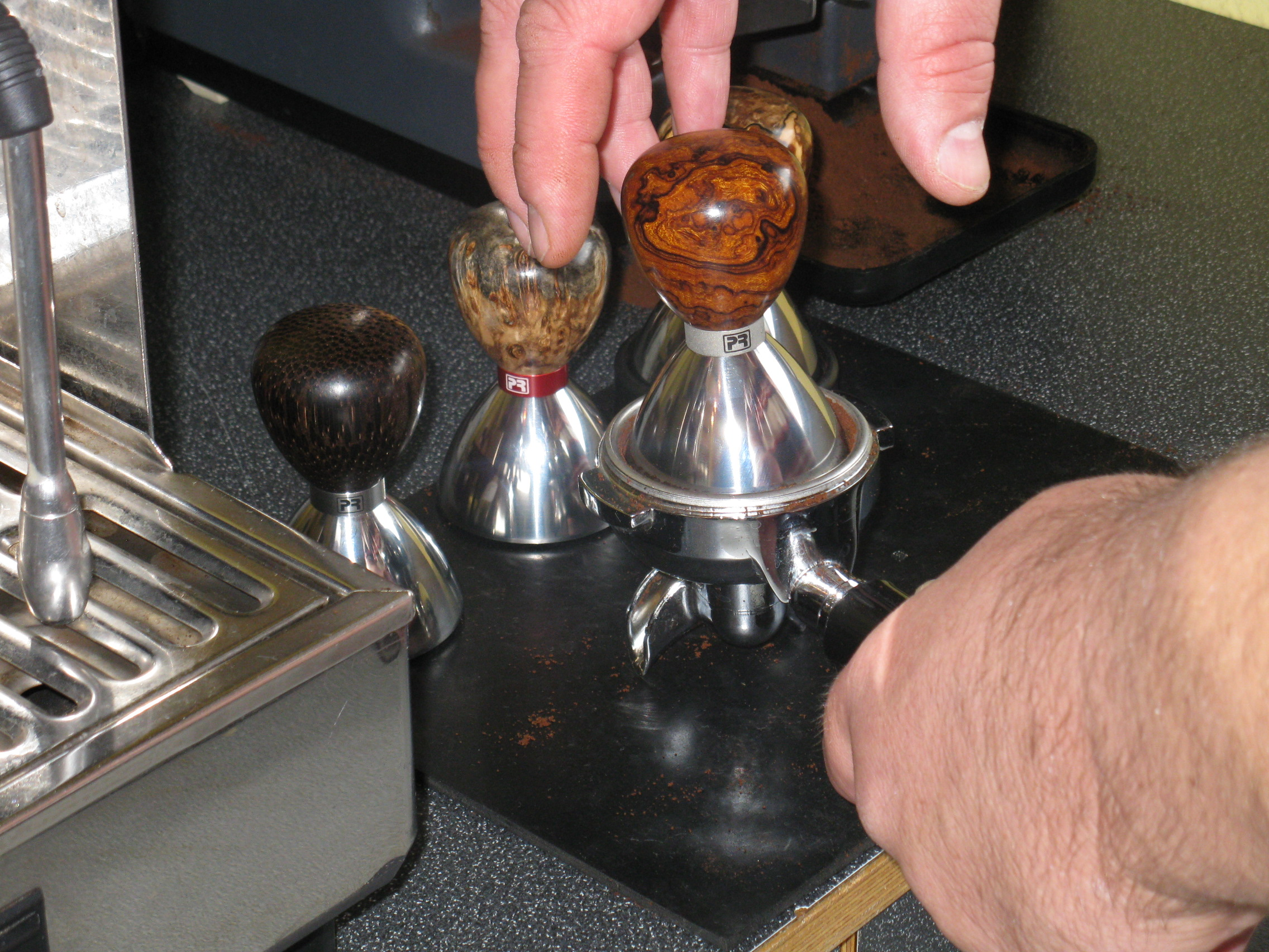 Benutzung eines Espresso-Tampers, gesehen bei einer Veranstaltung